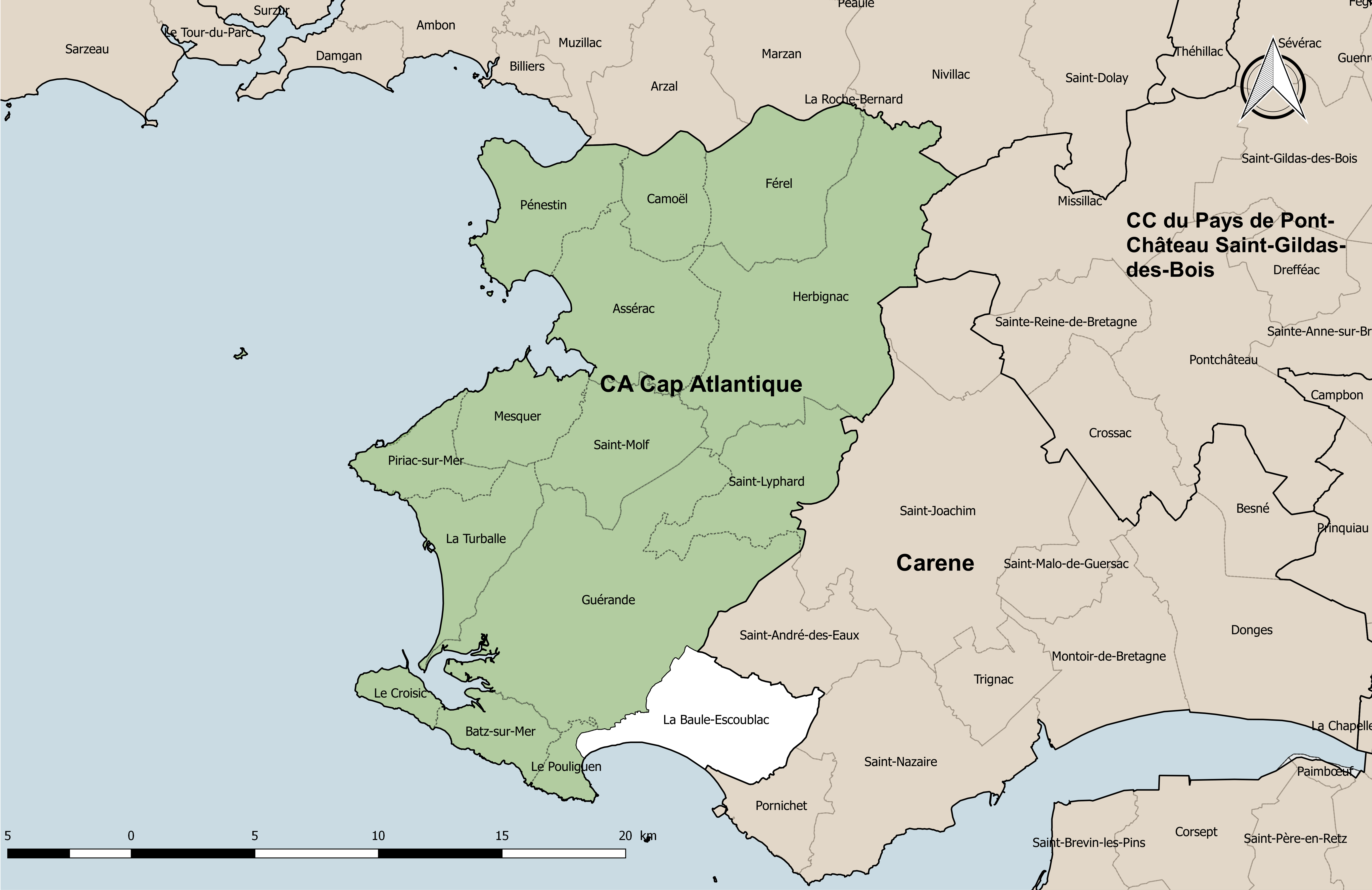 Localisation de la commune de La Baule-Escoublac dans la carte des établissements publics de coopération intercommunale.